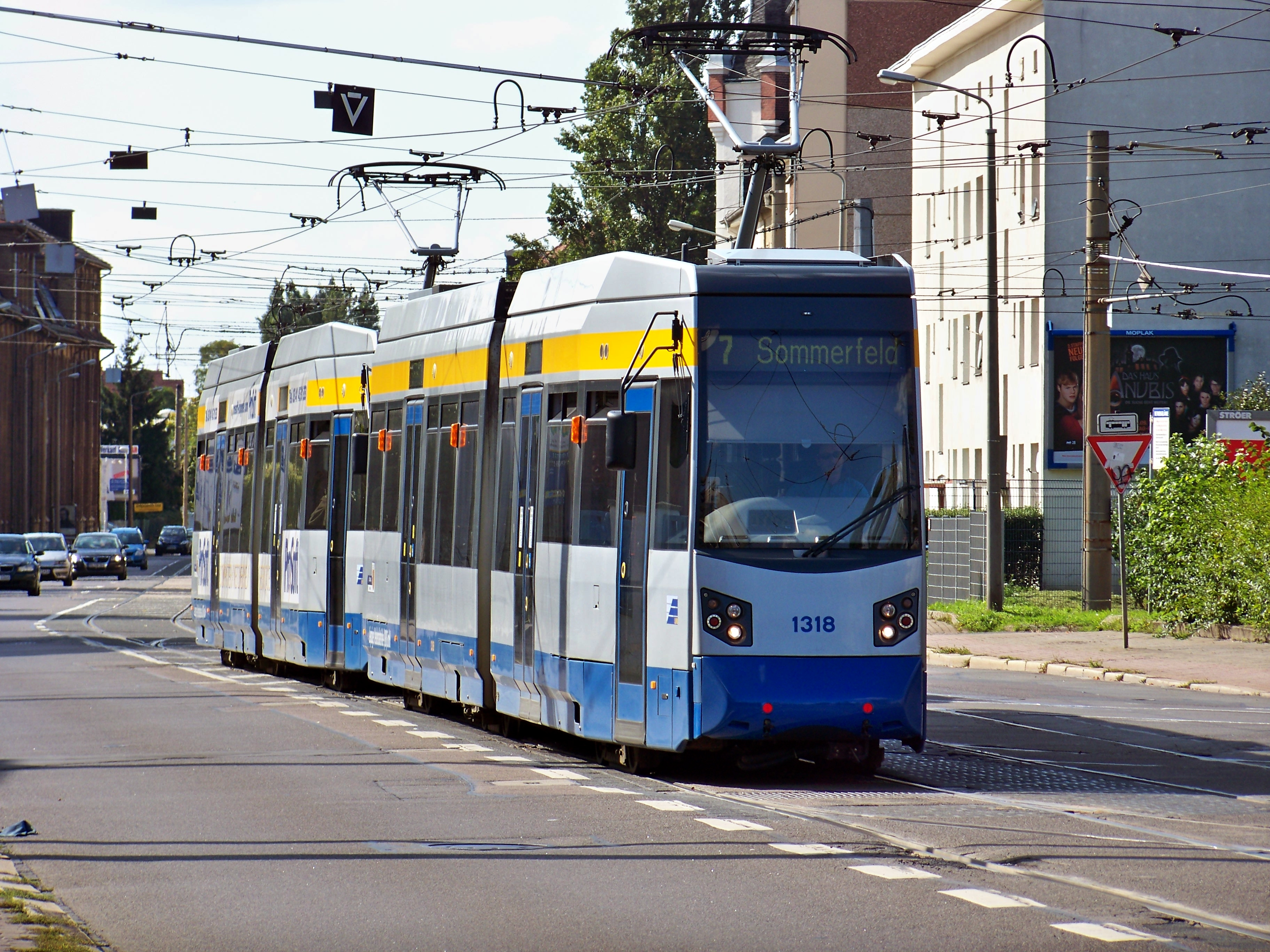 NGTW6 (Leoliner) in Doppeltraktion auf der Linie 7 (Böhlitz-Ehrenberg–Sommerfeld) an der Haltestelle Paunsdorf, Strbf in der Riesaer Straße